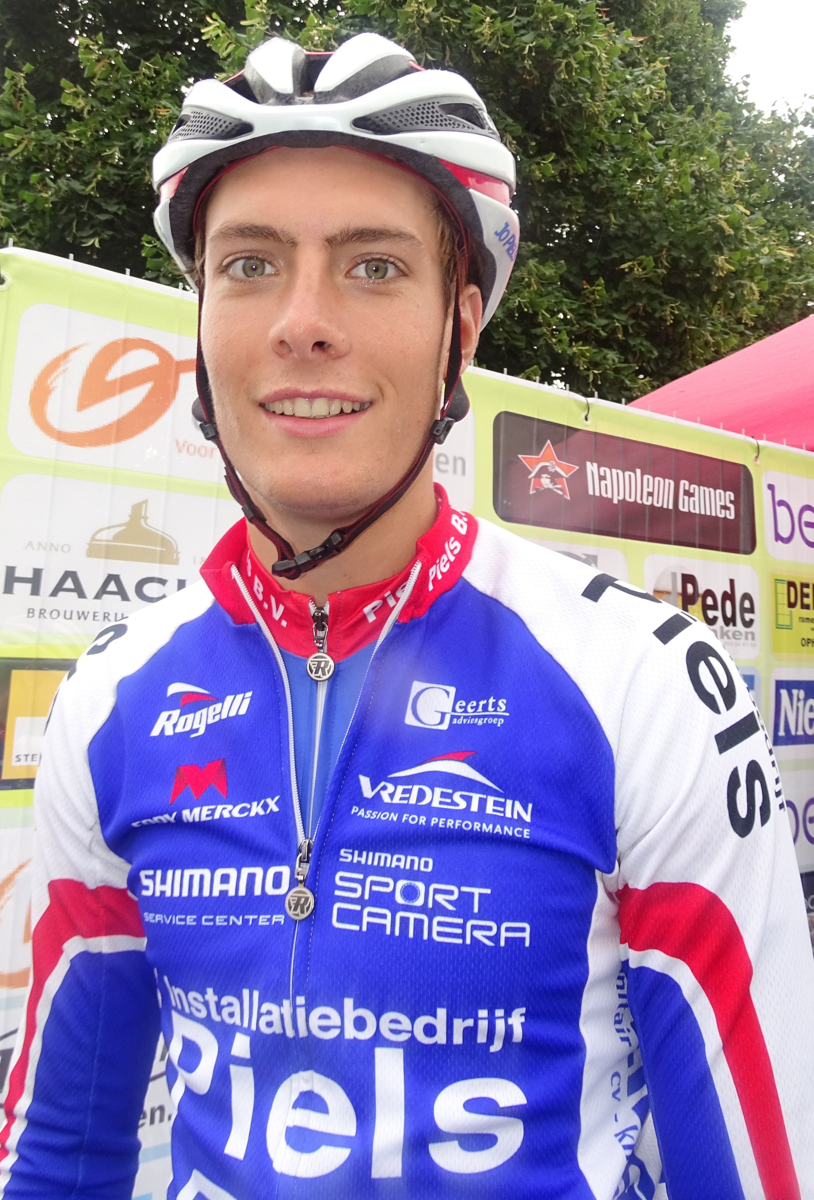 Reportage réalisé le mardi 18 août à l'occasion du départ et de l'arrivée du Grand Prix de la ville de Zottegem 2015 à Zottegem, Belgique.